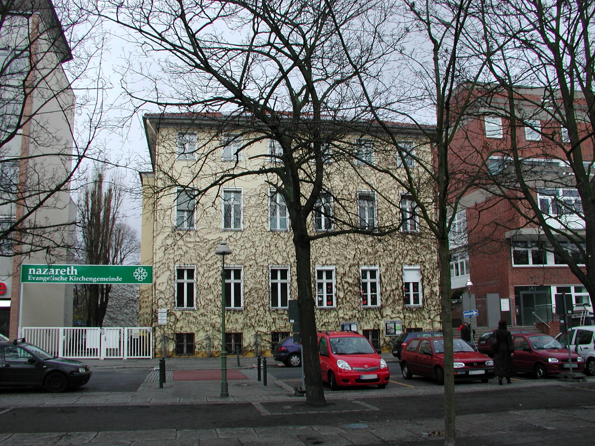 Gemeindehaus (2)